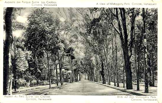 Parque Los Caobos en Caracas - Venezuela hacia 1940